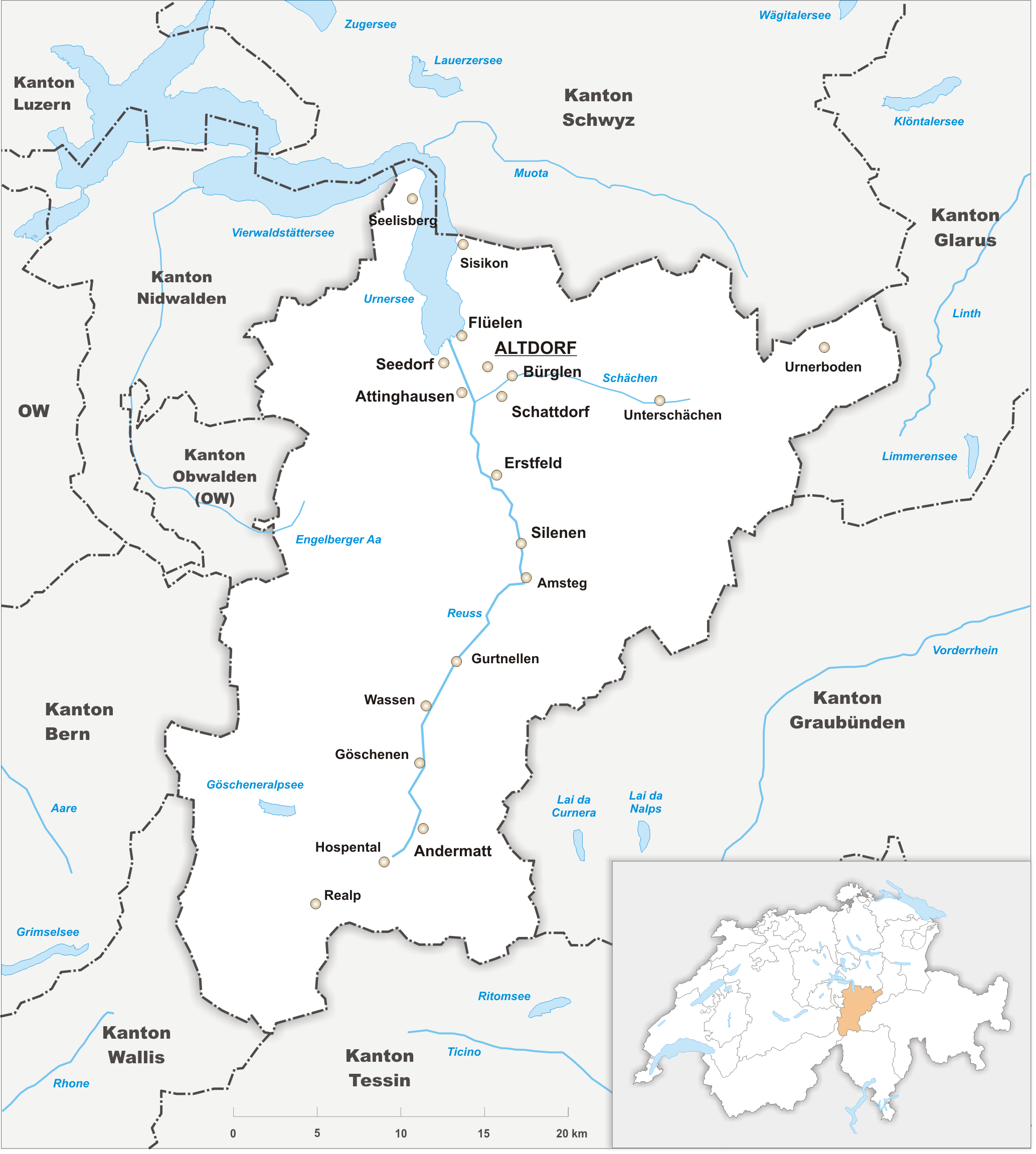 Karte des Kanton Uri.